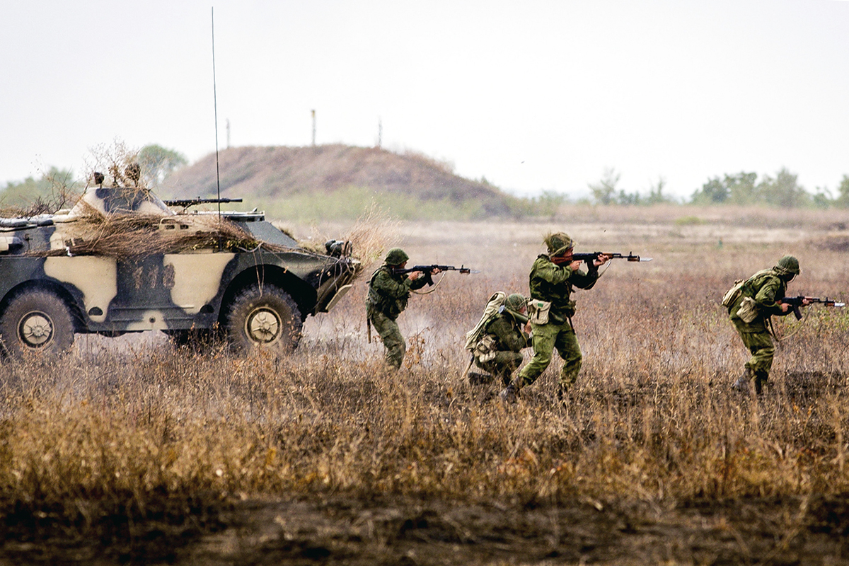 Полевой выход военнослужащих мотострелкового батальона Оперативной группы российских войск в Приднестровской молдавской республике.